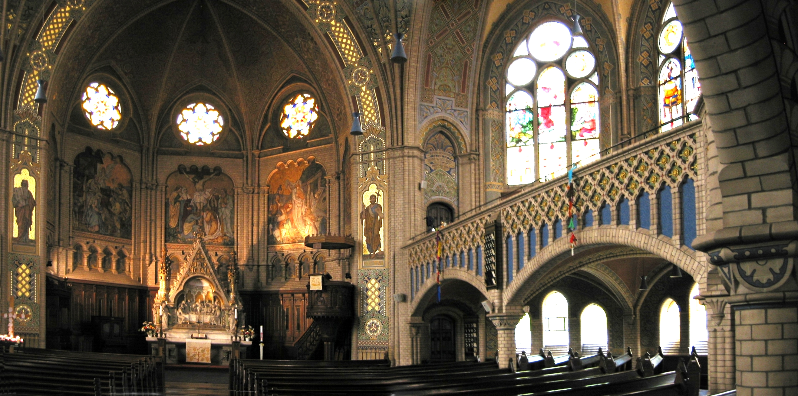 Altenburg Brüderkirche innen Panorama 2 korr